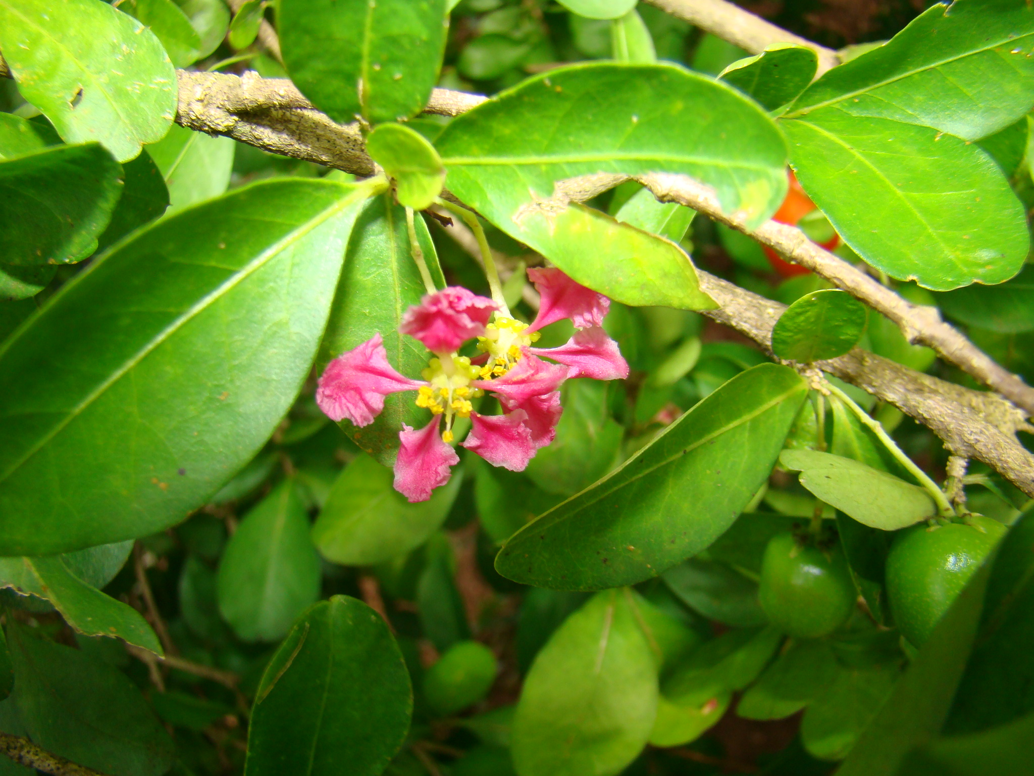 acerola (Malpighia emarginata)